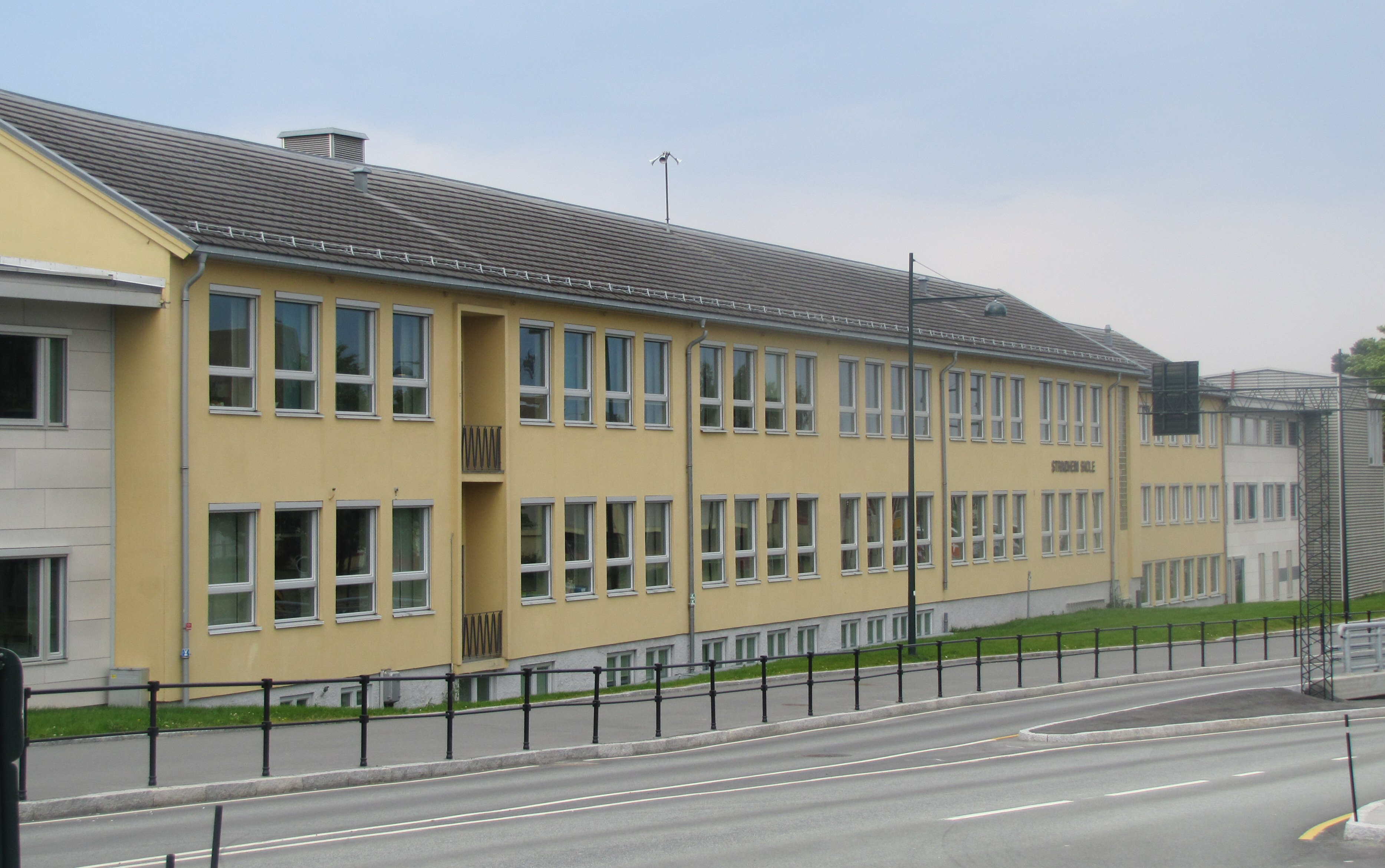 Strindheim skole, Trondheim